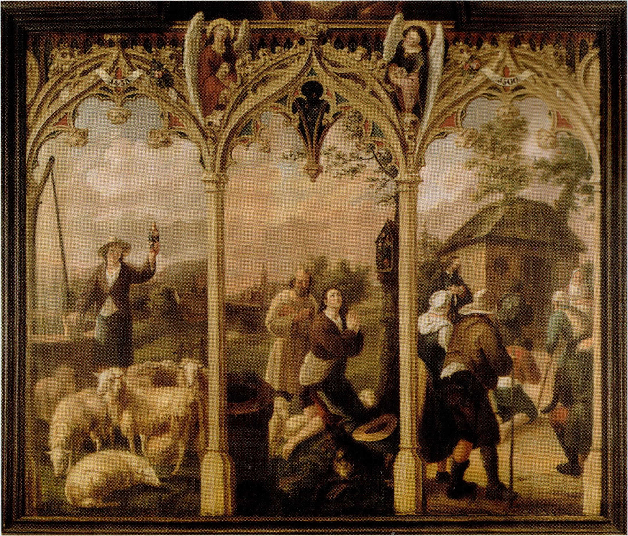 Anoniem. De geschiedenis van de Kapel in 't Zand in Roermond. 1852-1895. Olieverf (?). Afmetingen onbekend. Roermond, Kapel in 't Zand, sacristie.